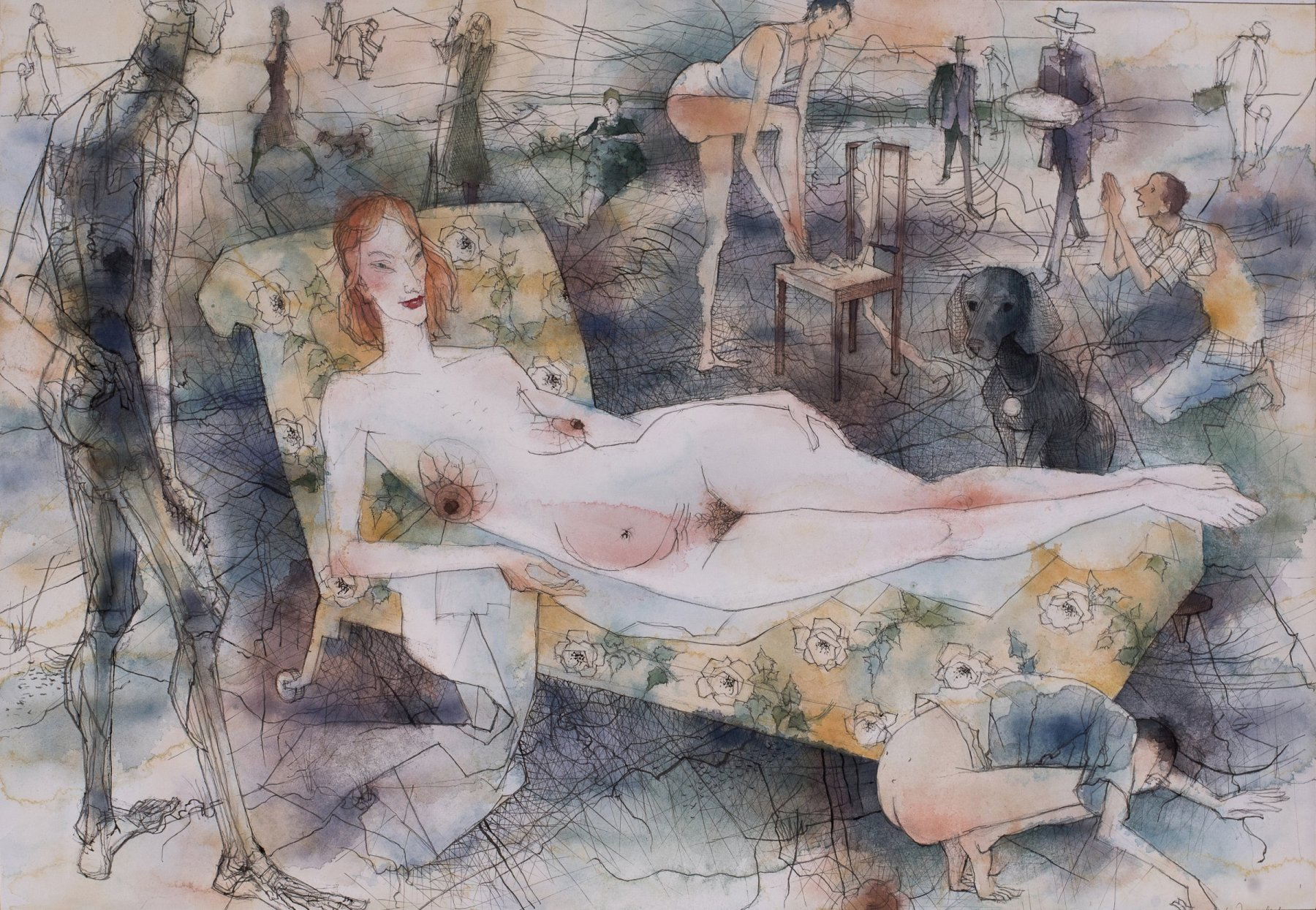 2018, Feder und Aquarell auf Papier, 42x60,5